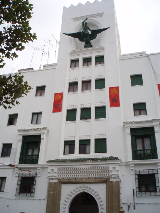 Antiguo edificio de la compañía de seguros española El Fénix en Tetuán (Marruecos)